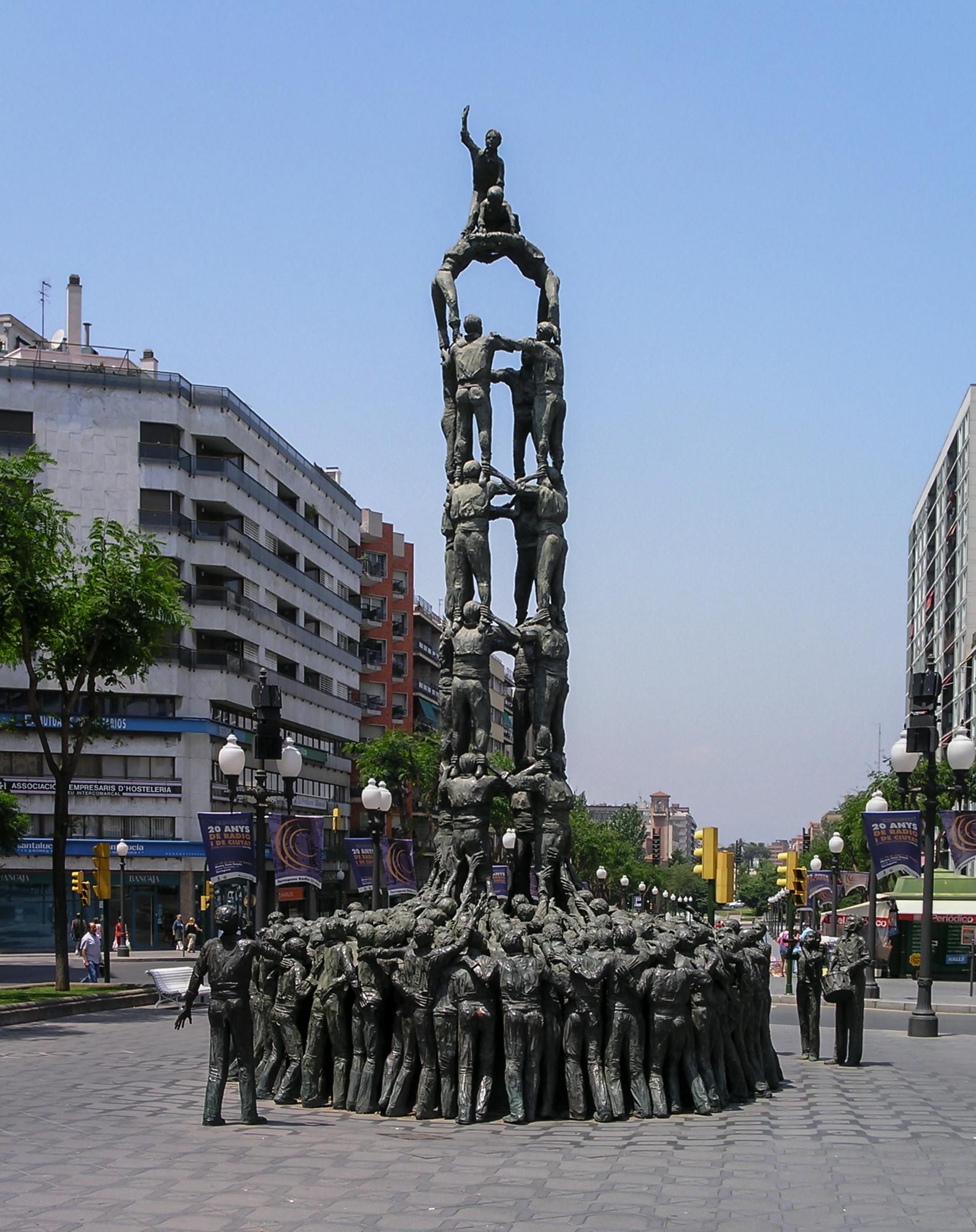 Skulptur „Castellers“, Tarragona, Spanien. Sculpture TitleMonument als castellersArtistFrancesc Anglès i GarciaDate1999